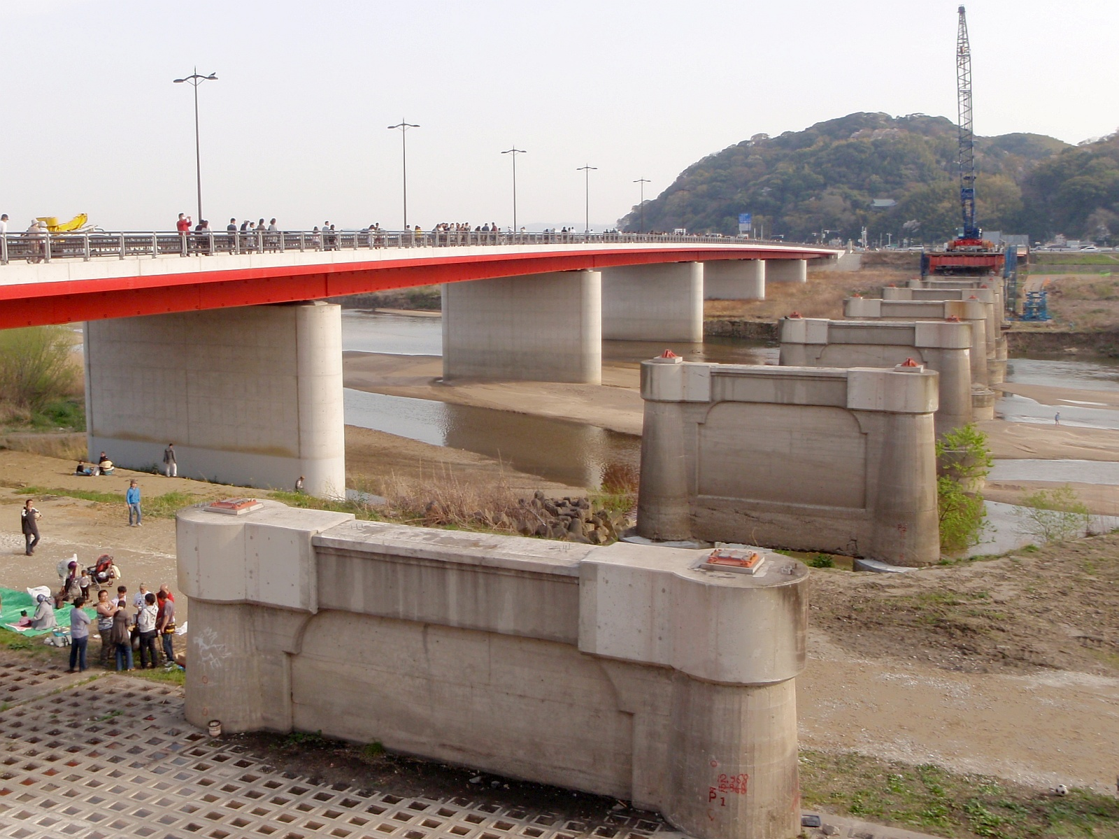 解体中の「木津川御幸橋（右側）。（京都府八幡市にて。北西側より撮影。左は現橋）